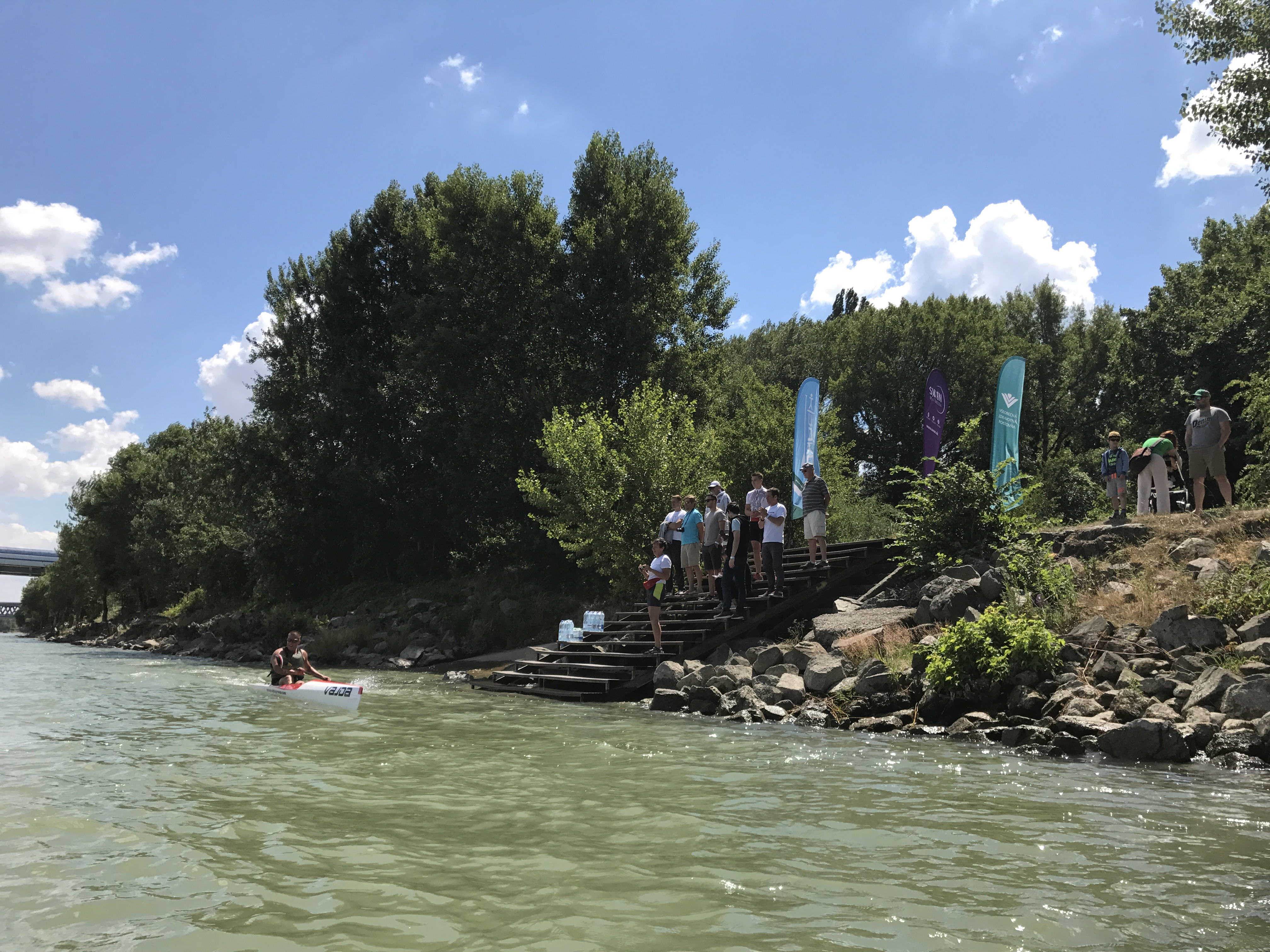 Schody do Dunaja od VK Dunajčík